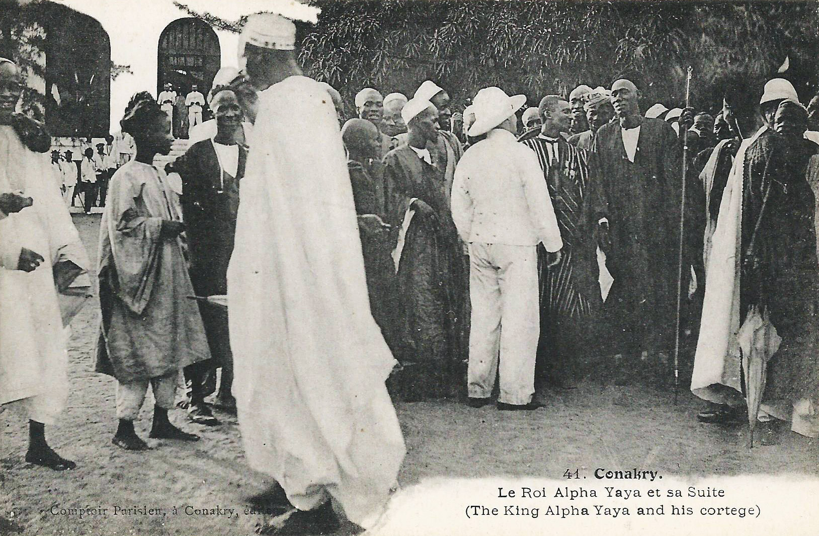 Conakry : Le roi Alpha Yaya et sa suite. Comptoir Parisien, Conakry.